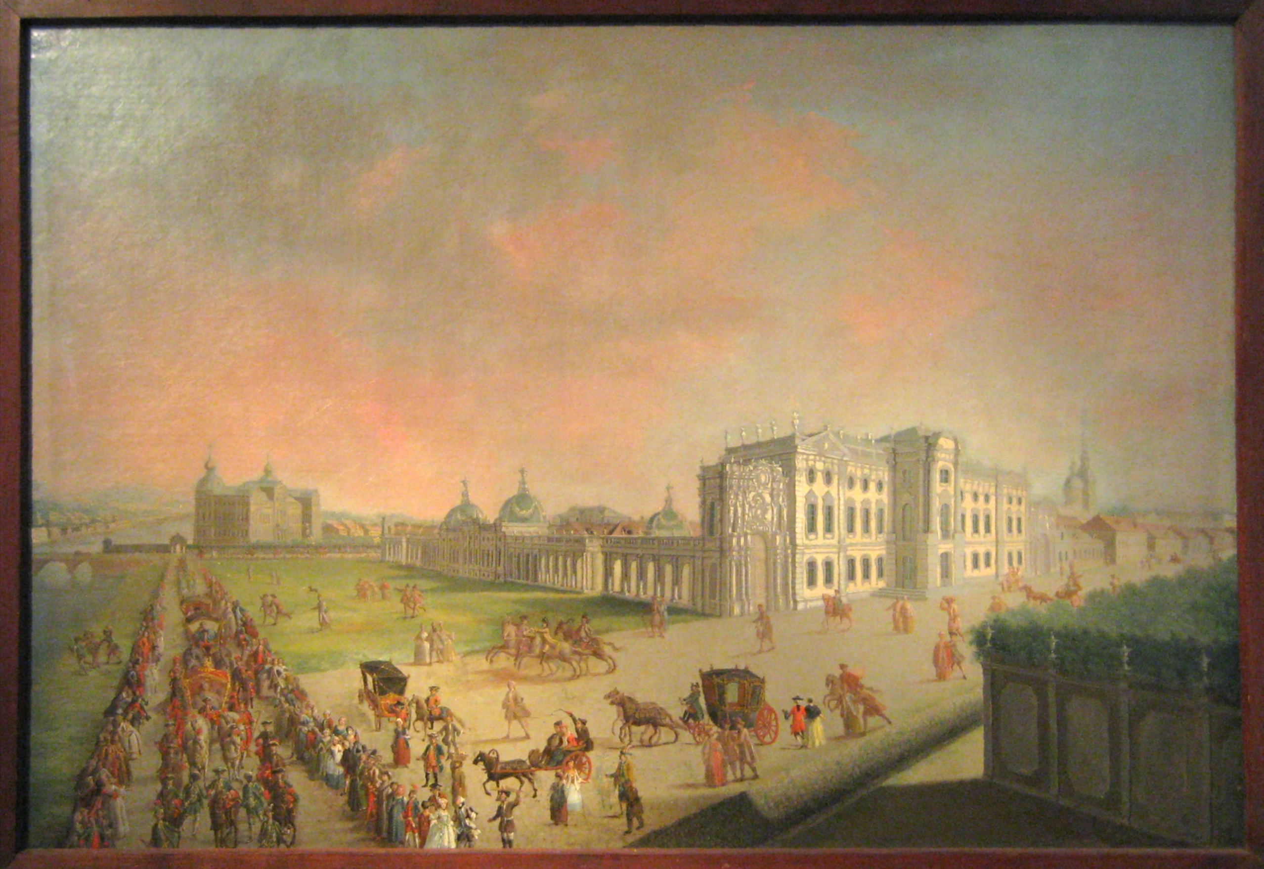 Неизвестный художник 18 века. "Выезд императрицы Елизаветы Петровны из Аничкова дворца". Cобрание Музея Усадьбы Кусково, 1750-е. Топографическая точность изображения помогает проследить маршрут. На дальнем плане картины видны Невский проспект от церкви Рождества Богородицы до Аничкова дворца и одноименного ему моста с частью процессии, начало которой во главе с каретой императрицы тянется вдоль дома Шувалова. Расположение построек соответствует плану Петербурга 1753 года